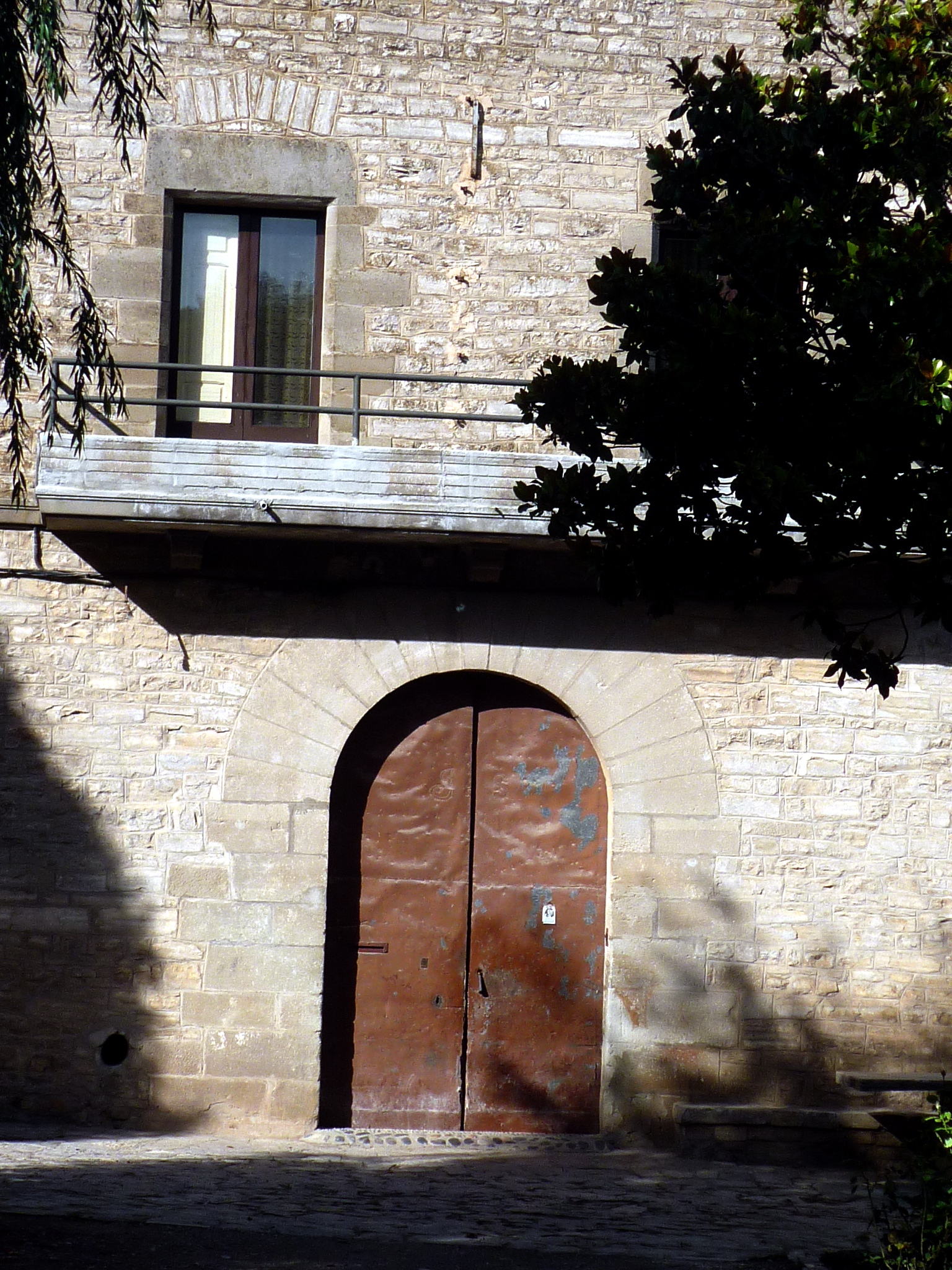 Cal Salat de Gàver (Estaràs): portalada